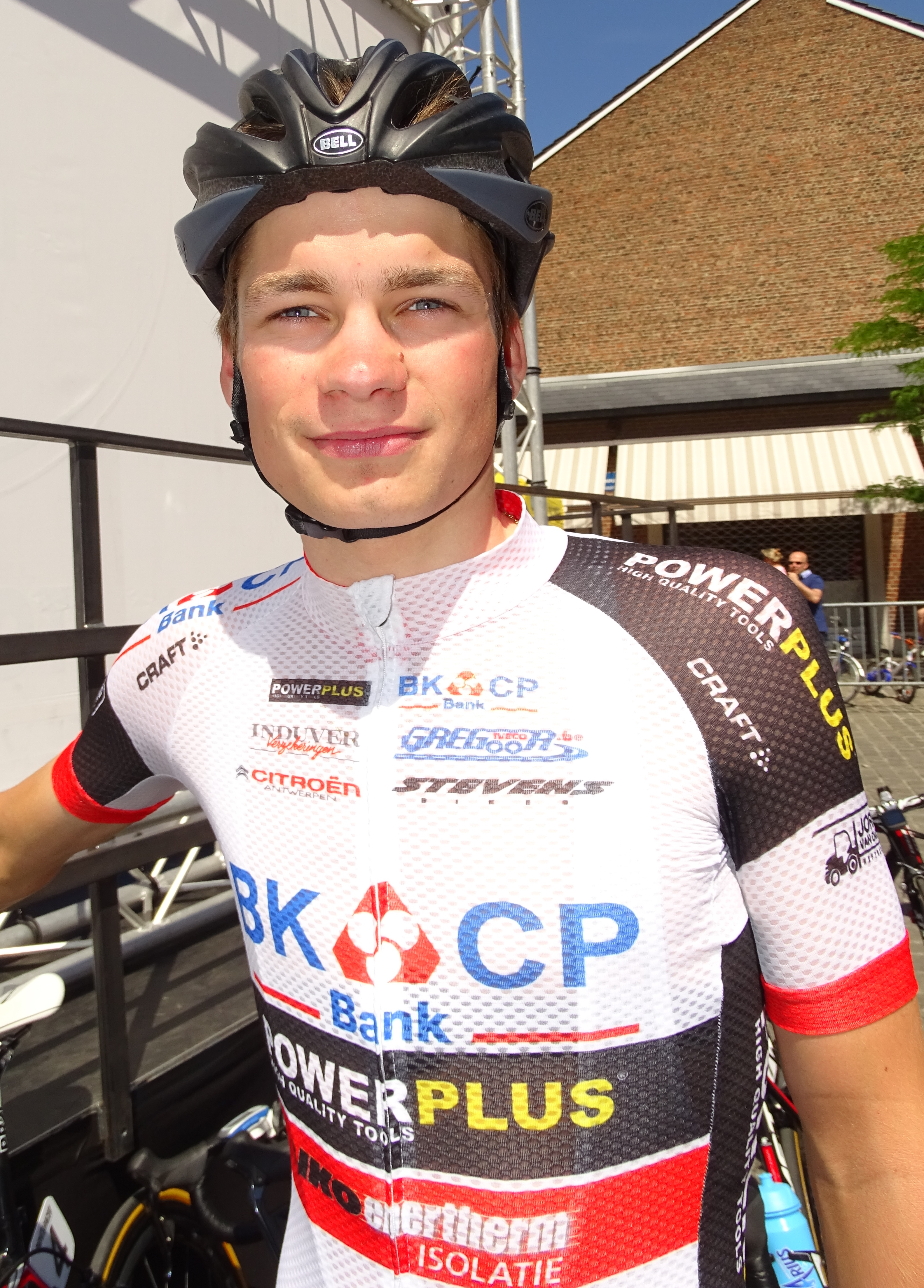 Reportage réalisé le dimanche 14 juin à l'occasion du départ et de l'arrivée du Tour du Limbourg 2015 à Tongres, Belgique.